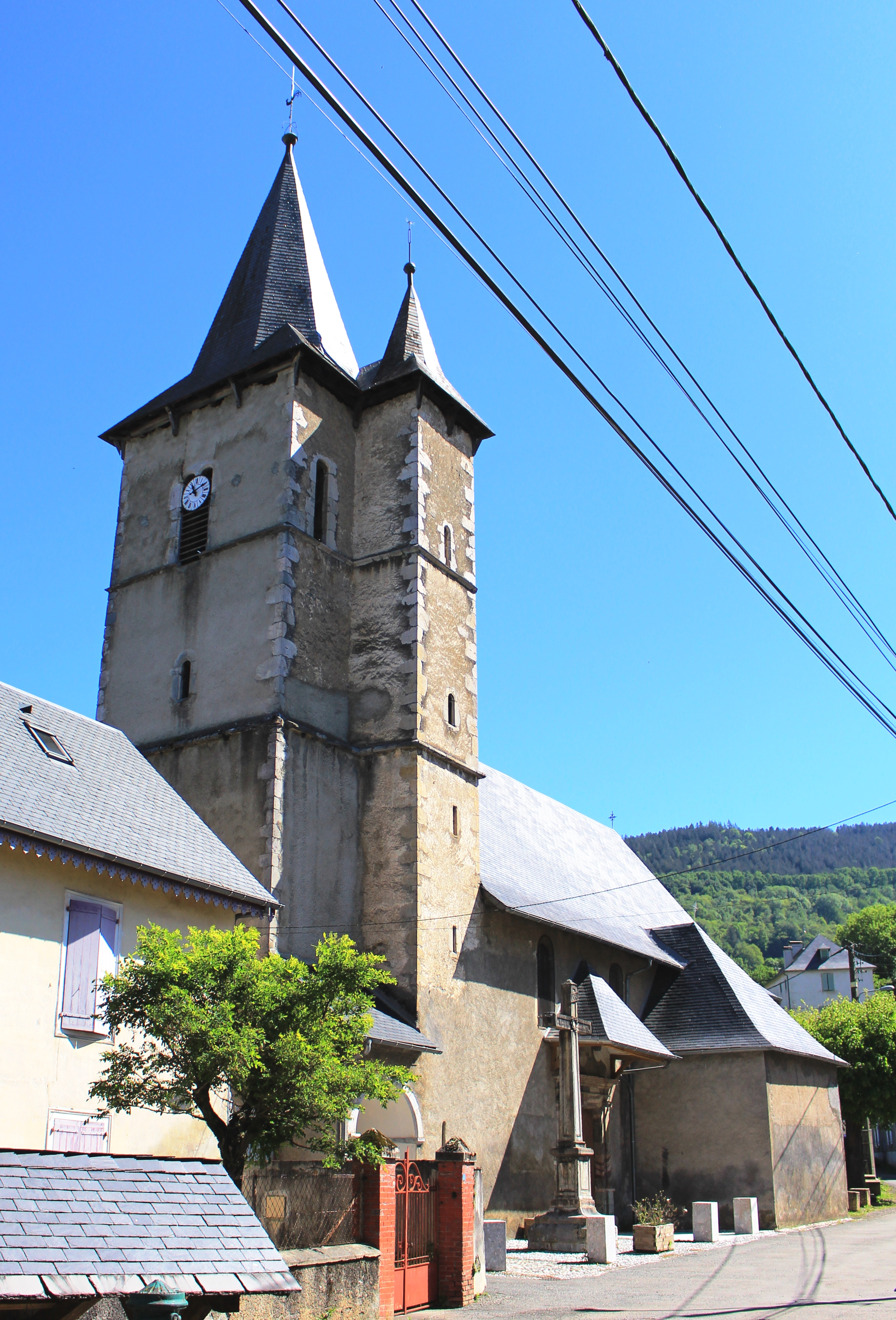 Église Notre-Dame d'Asté (Hautes-Pyrénées)